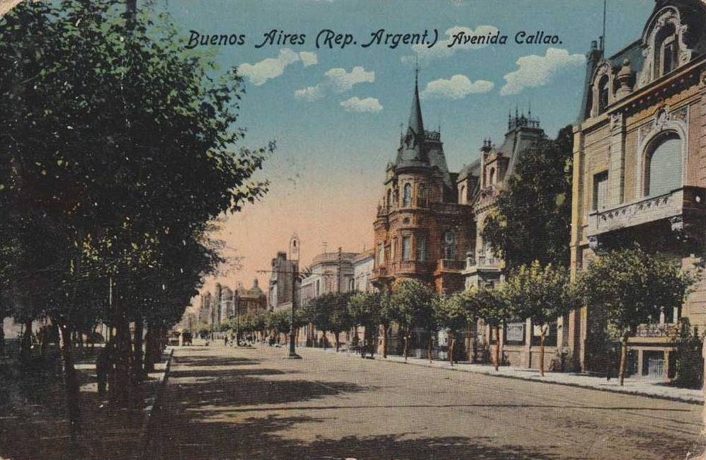 Vista de las casas de Avenida Callao frente a la Plaza Rodríguez Peña a comienzos del siglo XX. Postal coloreada.